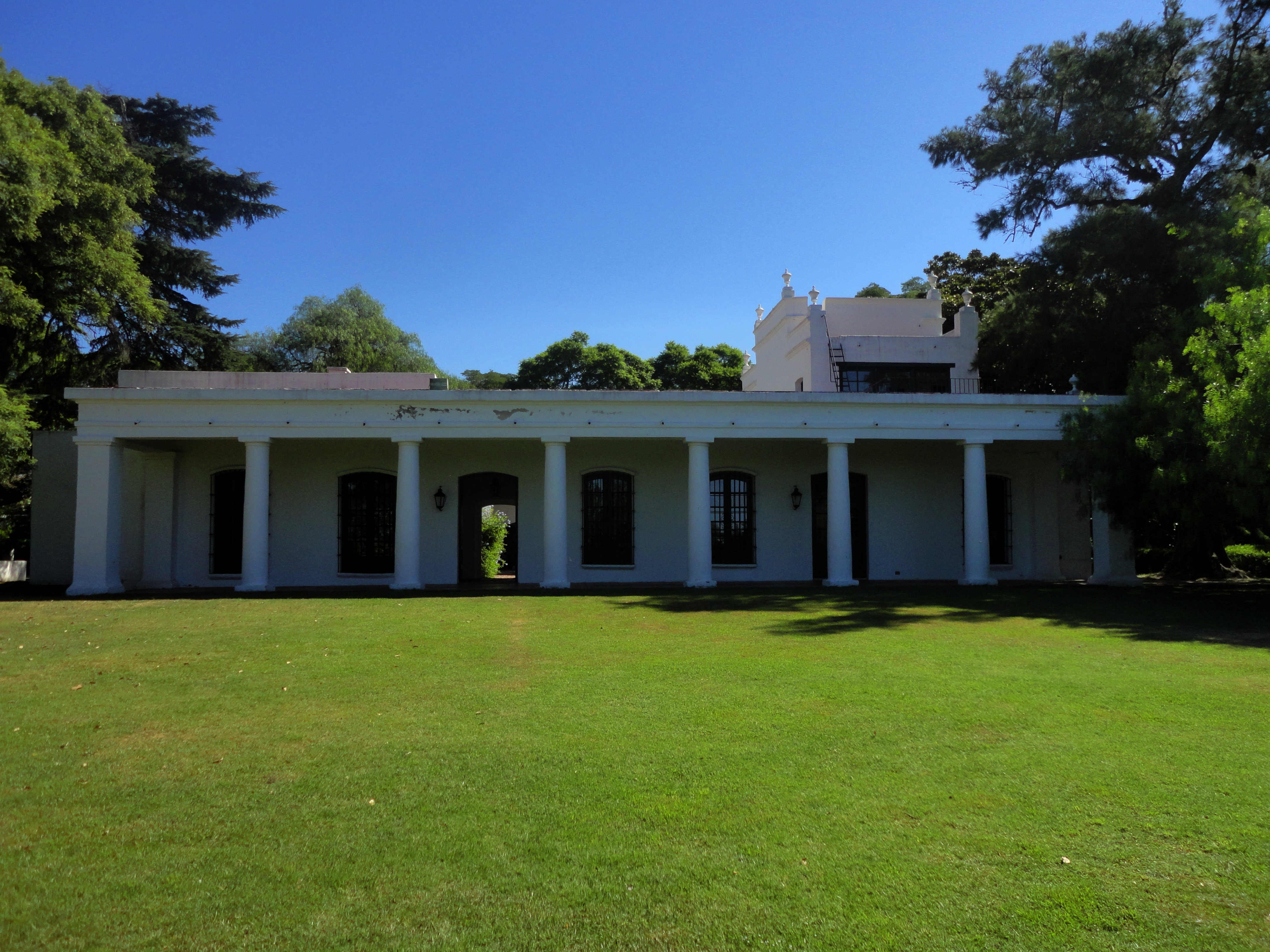 Casa quinta que perteneció a Juan Martín de Pueyrredón ubicada en Acassuso (San Isidro). Por aquí pasaron grande ilustres como Domingo.F Sarmiento, José de San Martín, entre otros. Actualmente es el Museo Pueyrredón